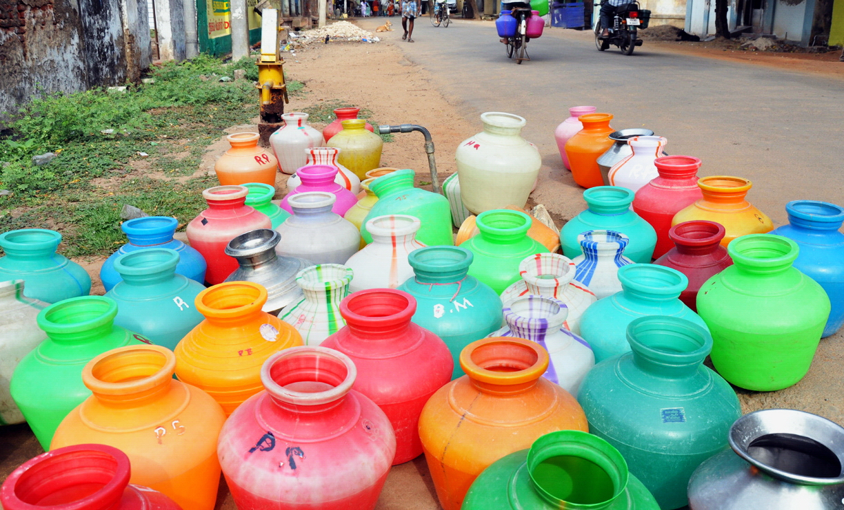 மதுரை மாவட்டத்தின் ஒரு கிராமத்தில் சாலையோரம் அடுக்கி வைக்கப்பட்டிருக்கும் பல வண்ண தண்ணீர் குடங்கள்.